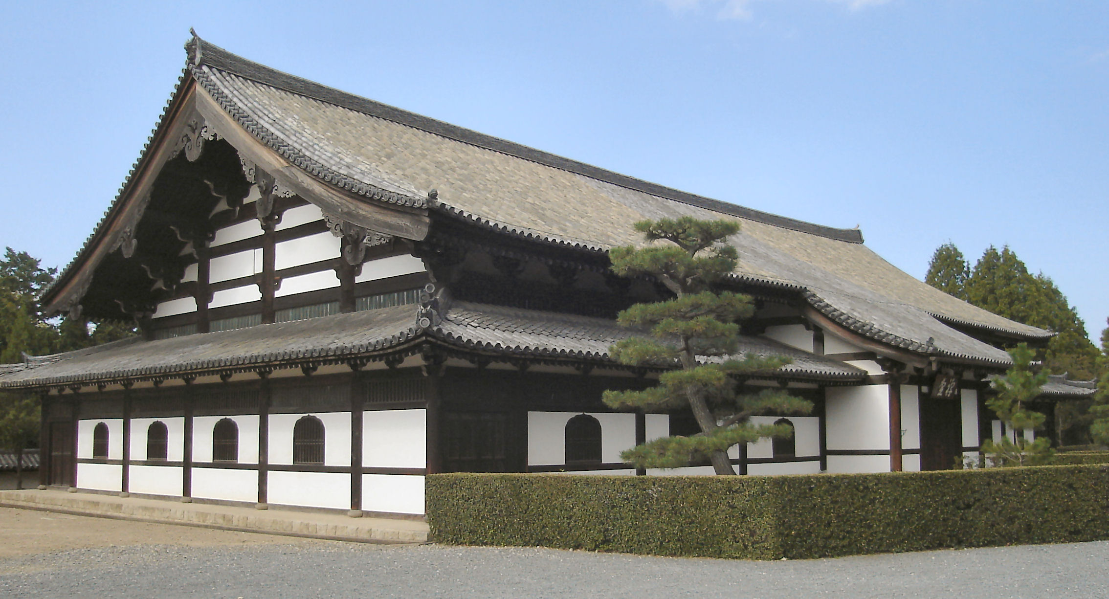 Tofukuji Zendo (東福寺 禅堂)